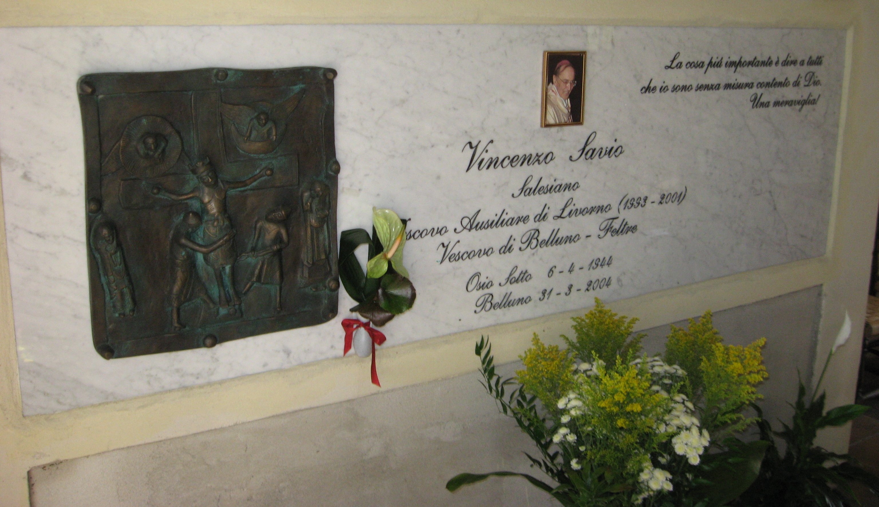 La tomba del vescovo Vincenzo Savio